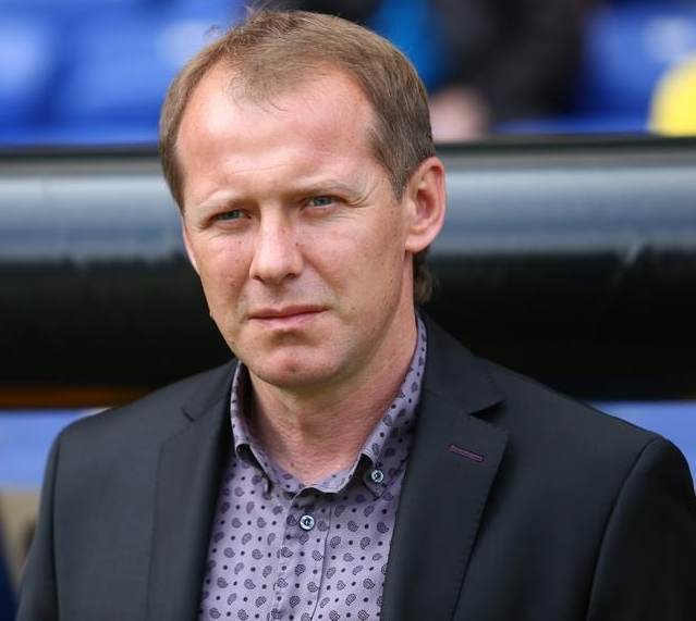 Игорь Рахаев